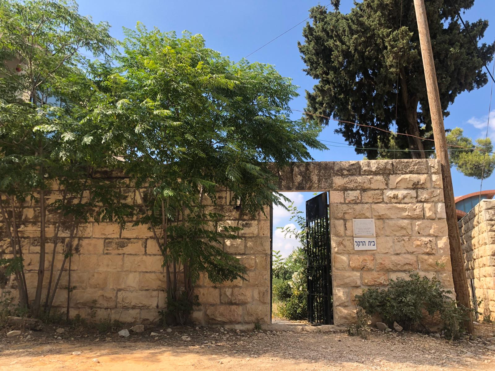 بيت من بيوت دير ياسين المهجرة في أعلى القرية